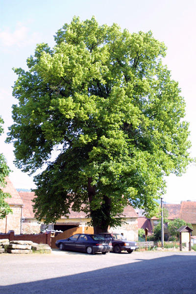 Zámecká lípa v Chudenicích.